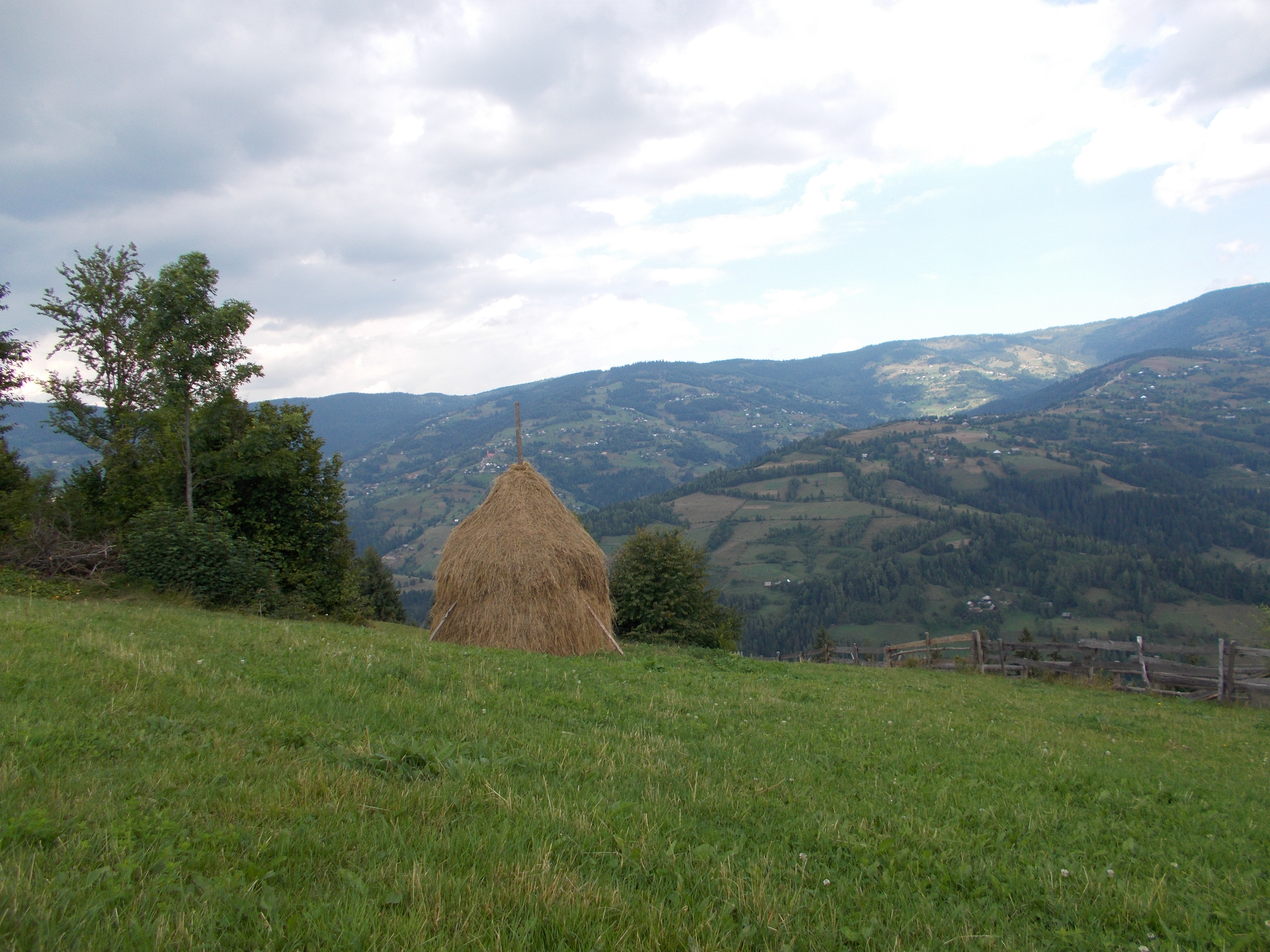 Peisaj rural - Comuna Horea, județul Alba